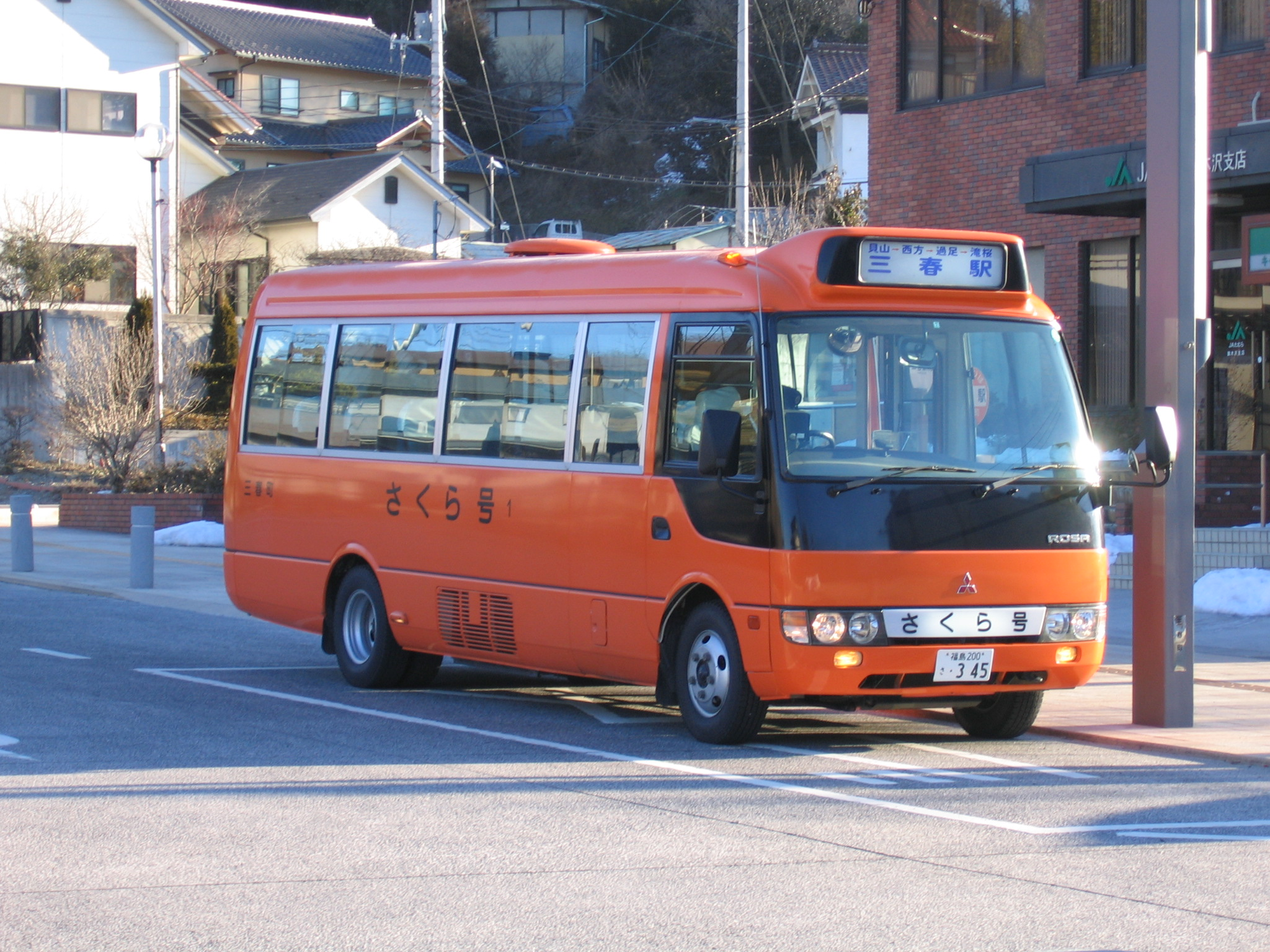 Miharu City Loop Bus "Sakura-go".